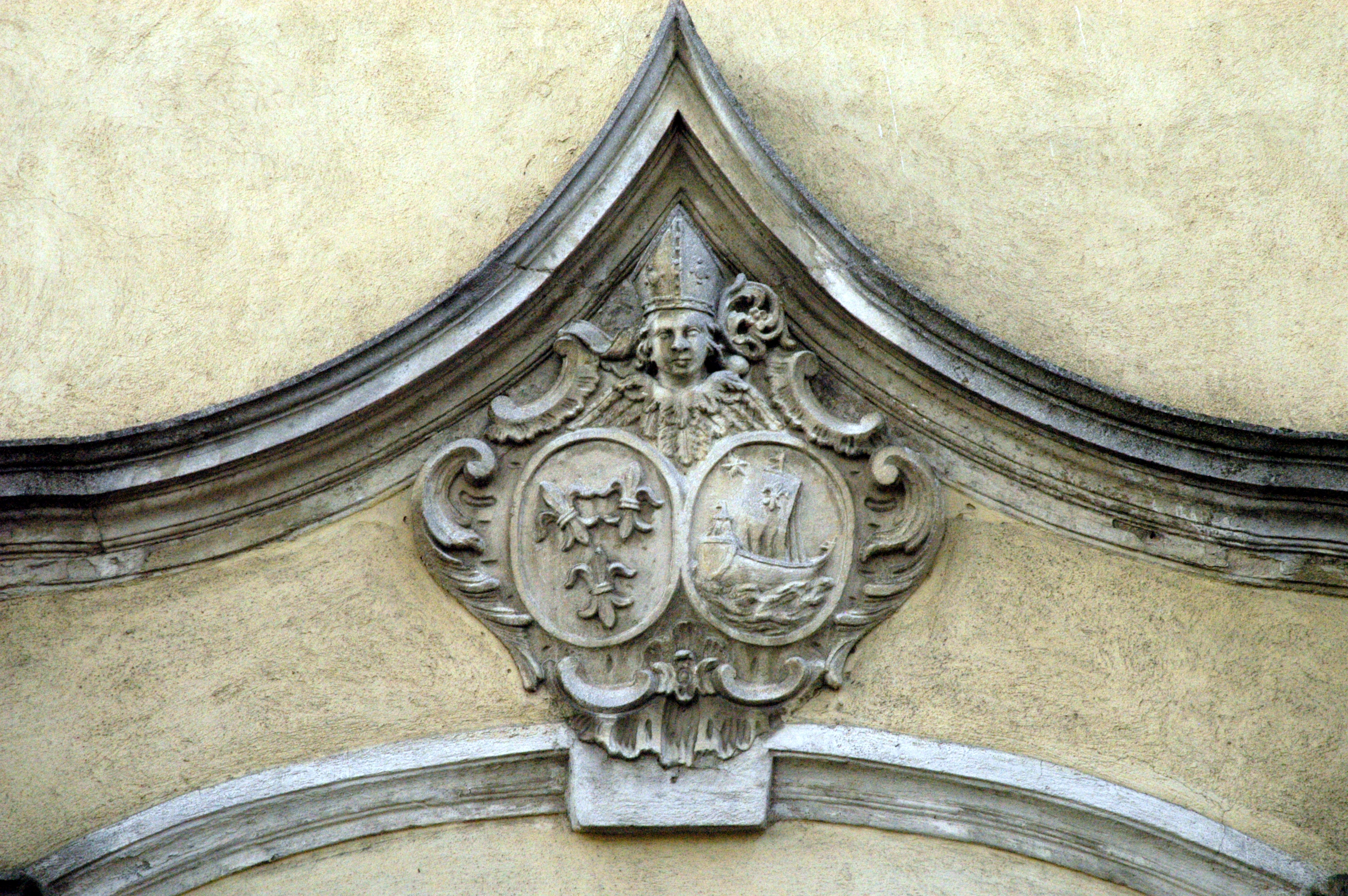 ehemaliger Wirtschaftshof in Unterdürnbach, Gemeinde Maissau - Wappen von Abt Dominik Peckenstorfer, Stift Lilienfeld, über dem Portal